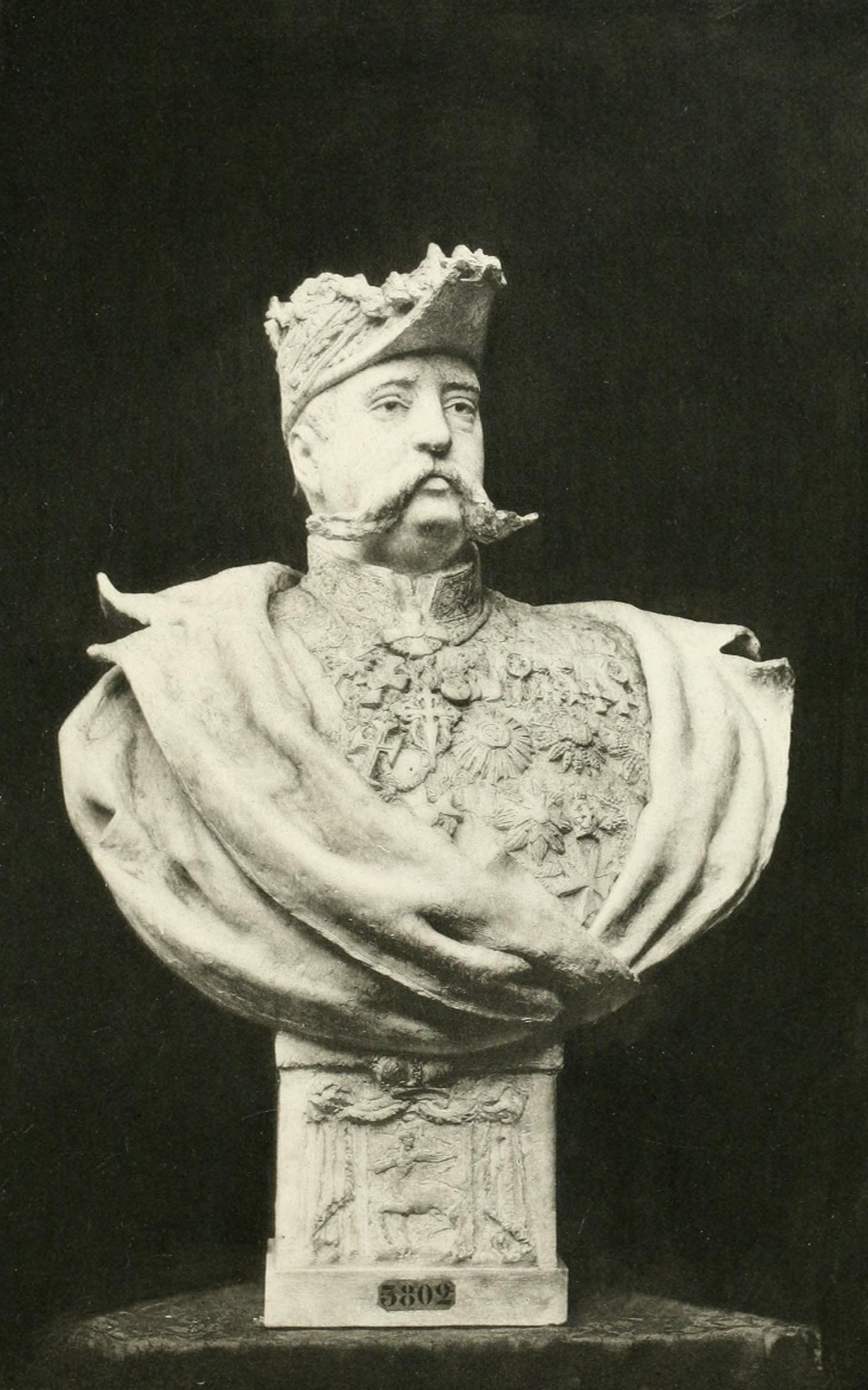 Buste du prince Gedroyc